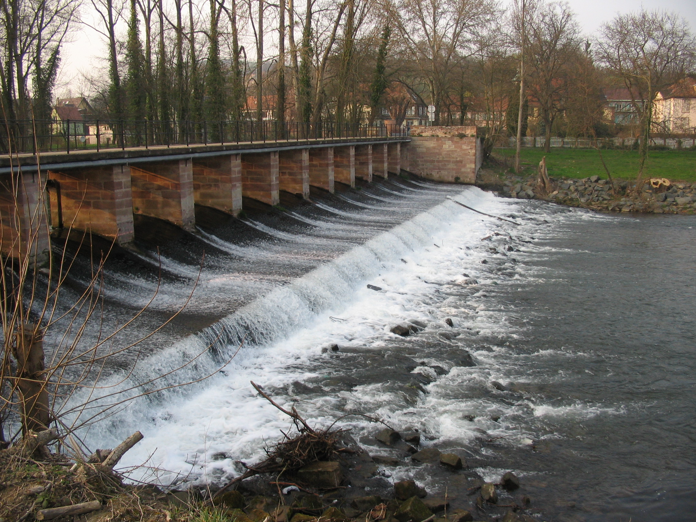 chute de la Bruche, après sa confluence avec la Mossig à Wolxheim, dans le Bas-Rhin